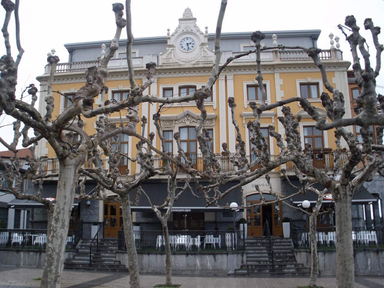 Plaza del Solar y Ayuntamiento de Portugalete (Bizkaia)